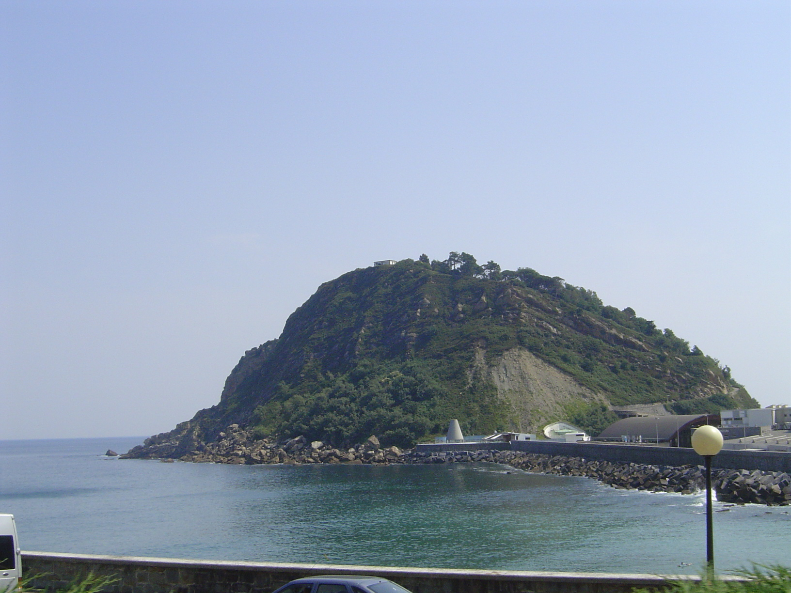 Montagne San Antón à Getaria, pays basque, vu du sud, le profil de souris n'est pas visible sous cet angle.